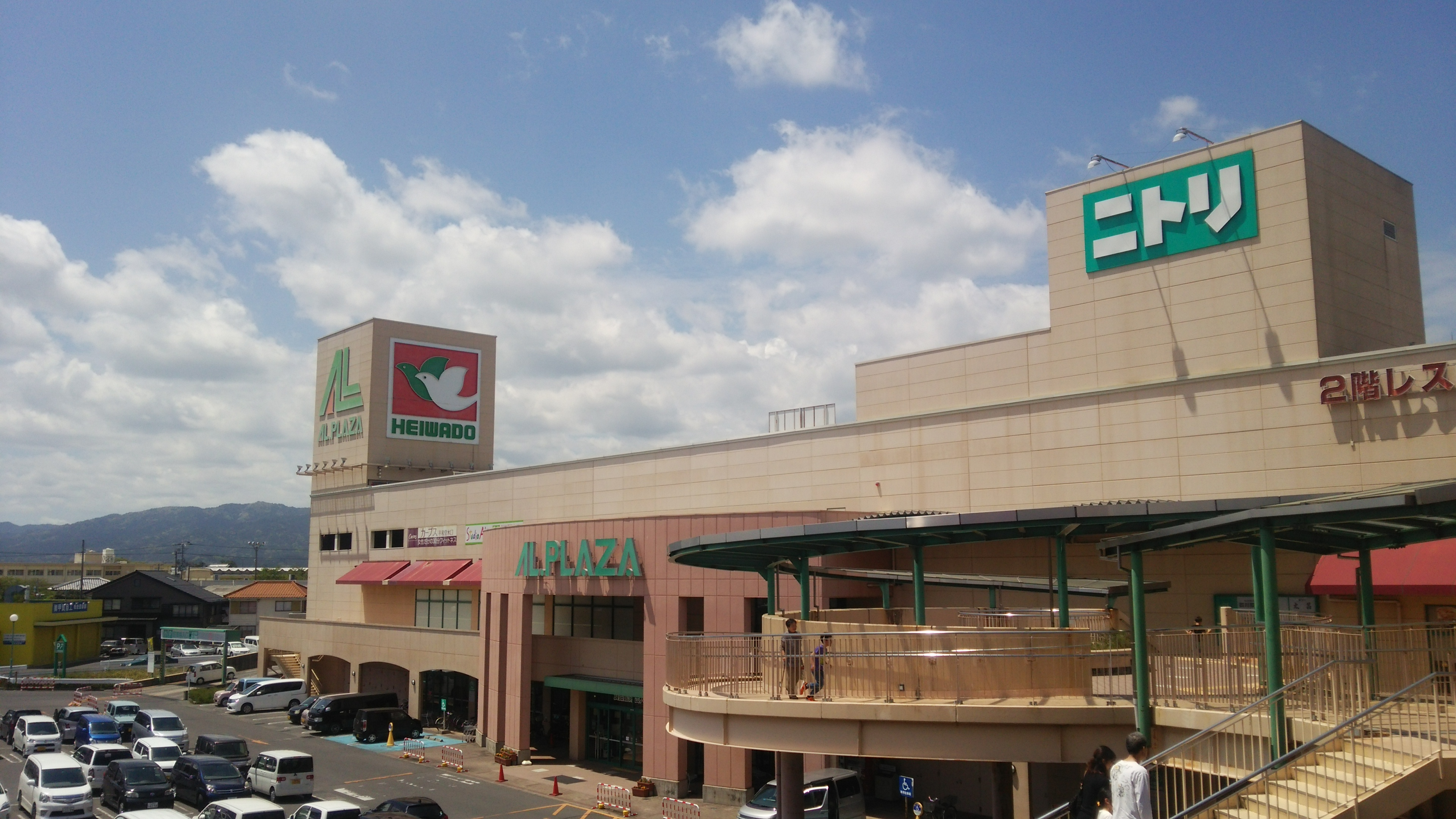 アル・プラザ水口の 2階 本棟⇔シネマ棟連絡通路から撮影した本館の外観です。